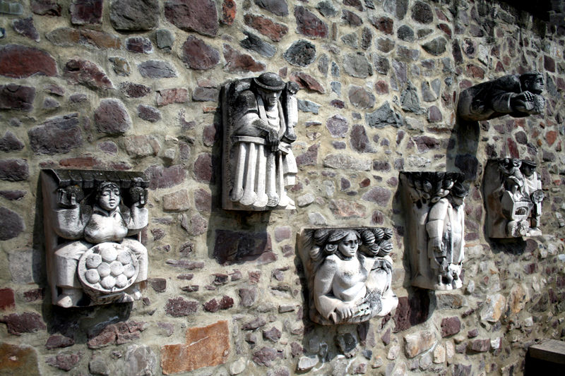 Magdeburger Originale an der Stadtmauer nahe der Magdalenenkapelle